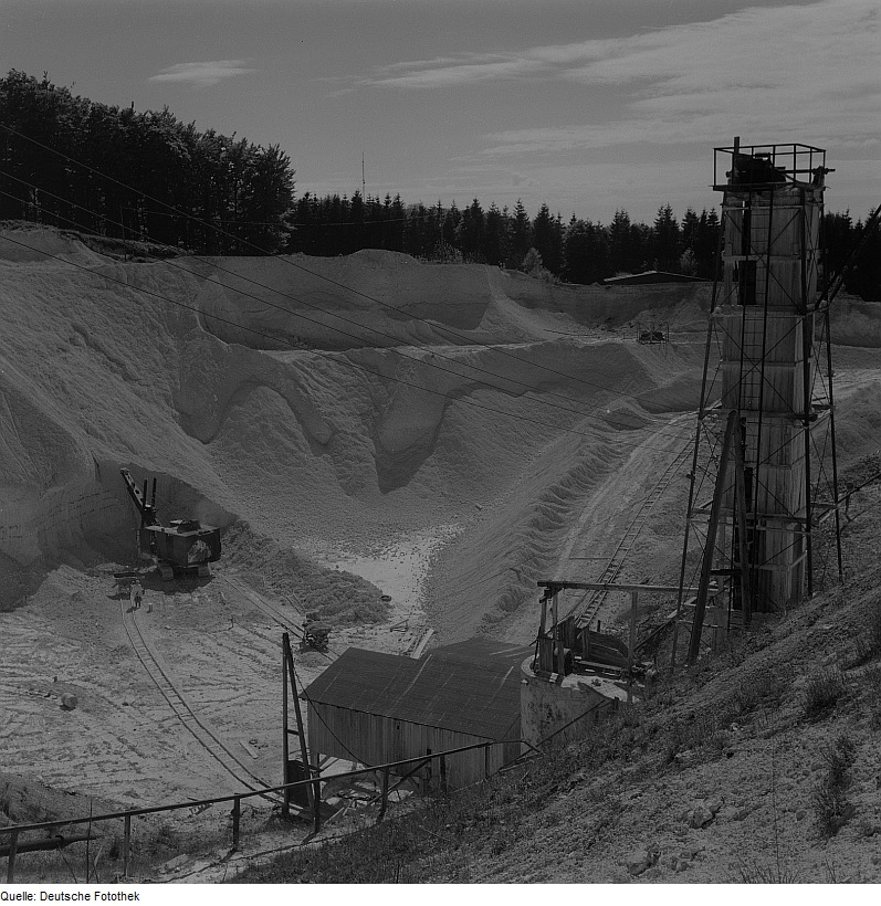 Original image description from the Deutsche Fotothek Buddenhagen. Kreidegewinnung im Kreidebruch